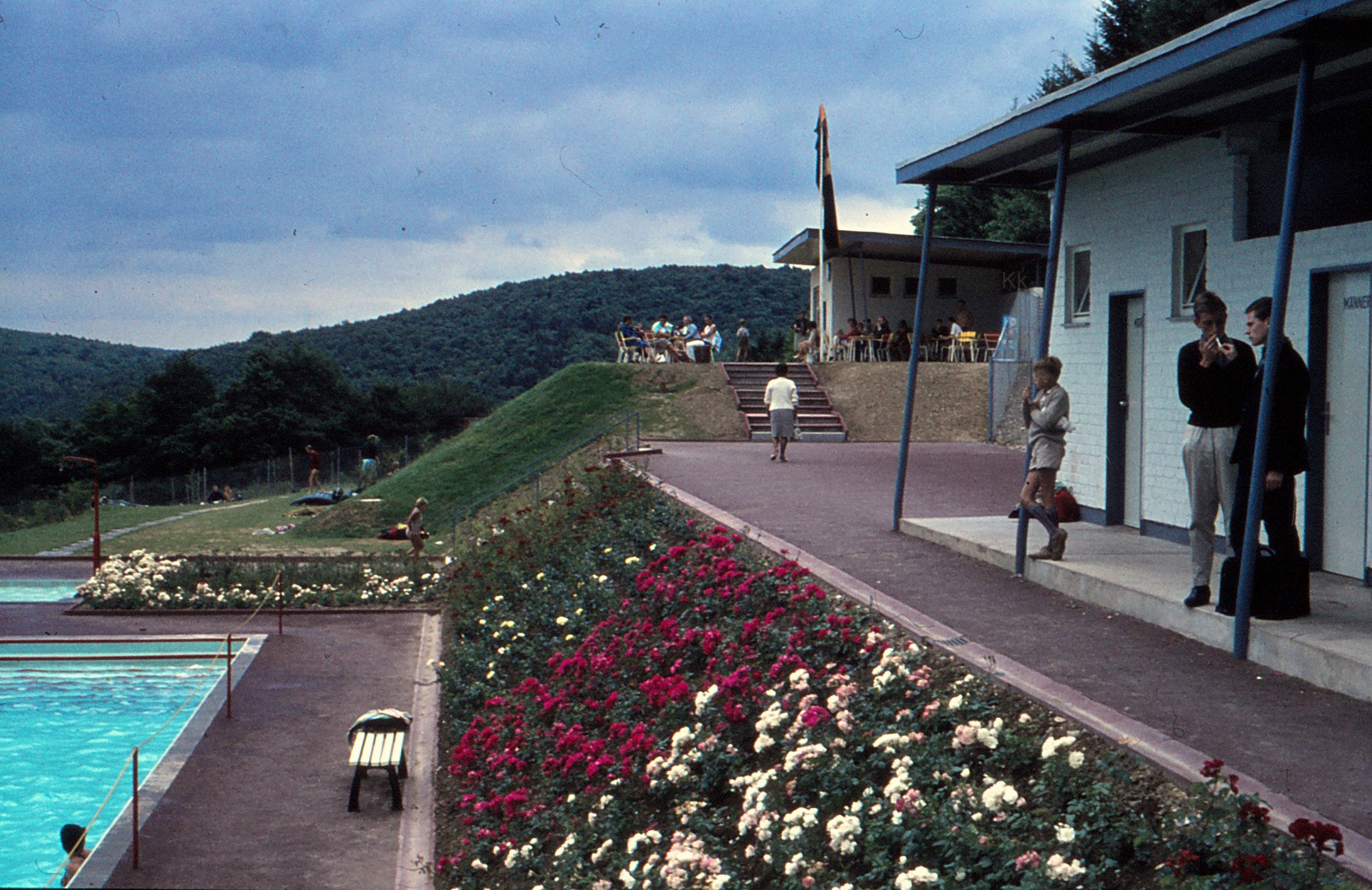 Am 14. Juli 1962 eröffnete das neu erbaute Höhenfreibad in Stromberg/Hunsrück. Die Aufnahme entstand im August 1962.